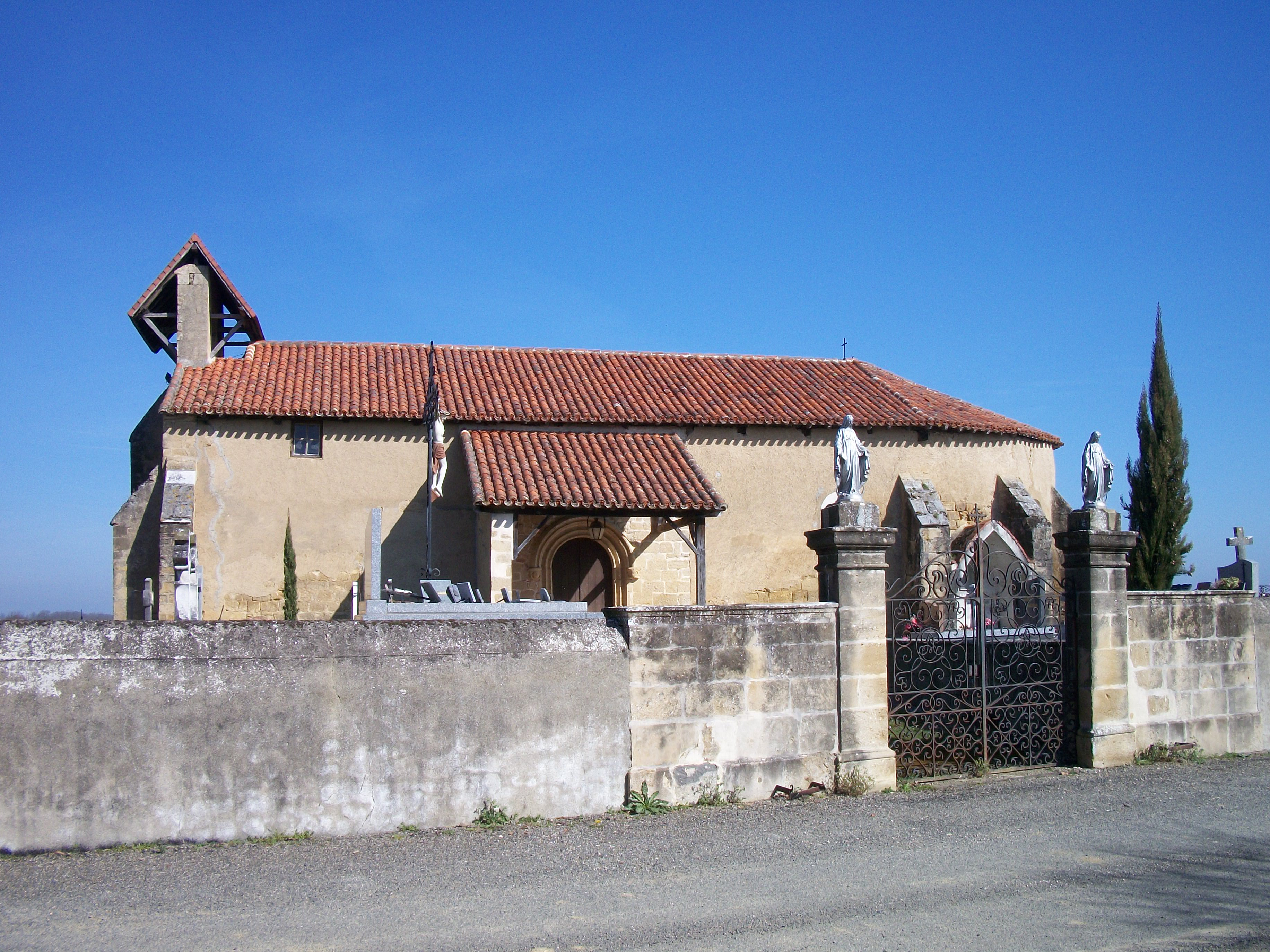 Église d'un hameau de Troncens (Gers, France)